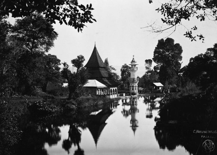 Foto. Moskee met minaret in Taloek bij Fort de Kock